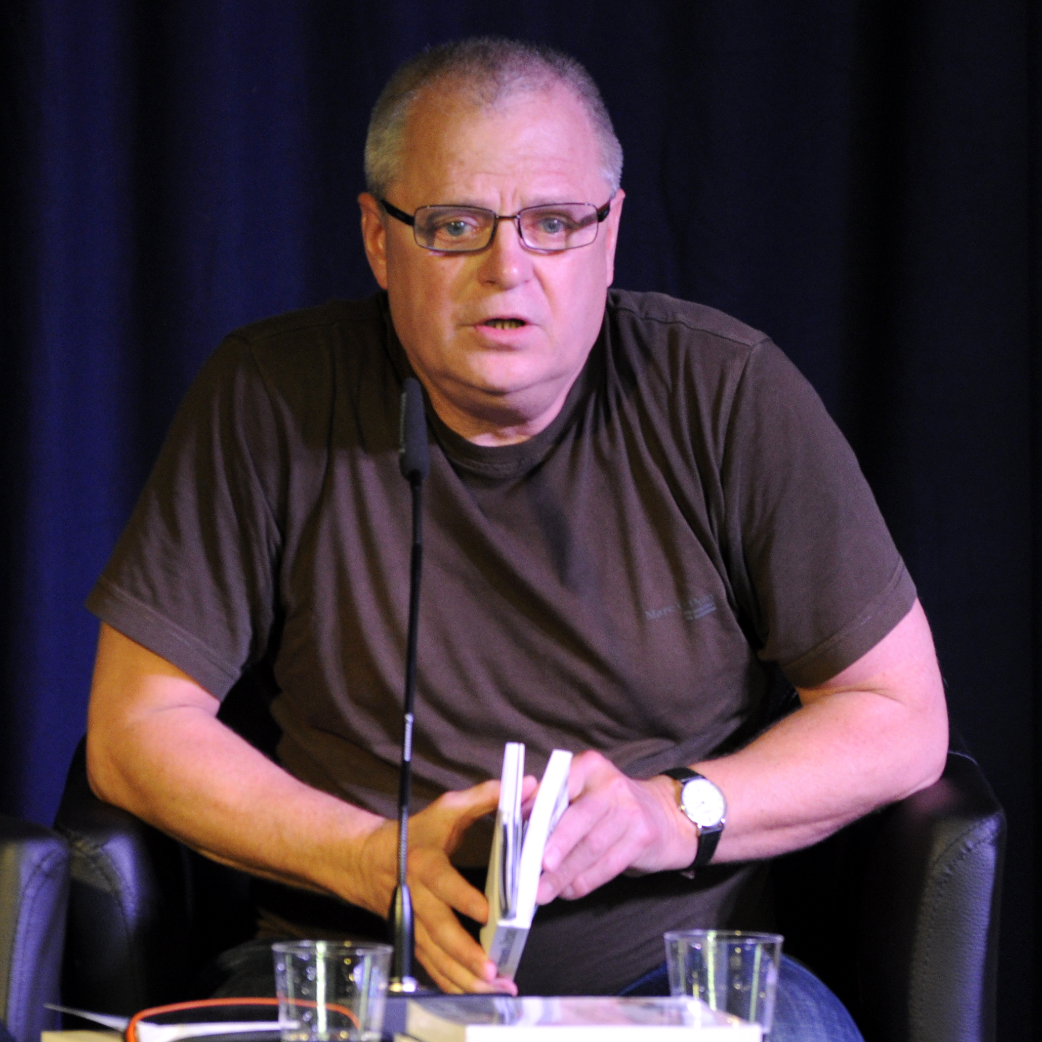 Norbert Weiß auf der Messe Schriftgut 2015